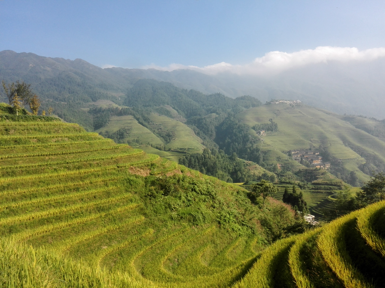 龙脊梯田1-2号观景台20150929